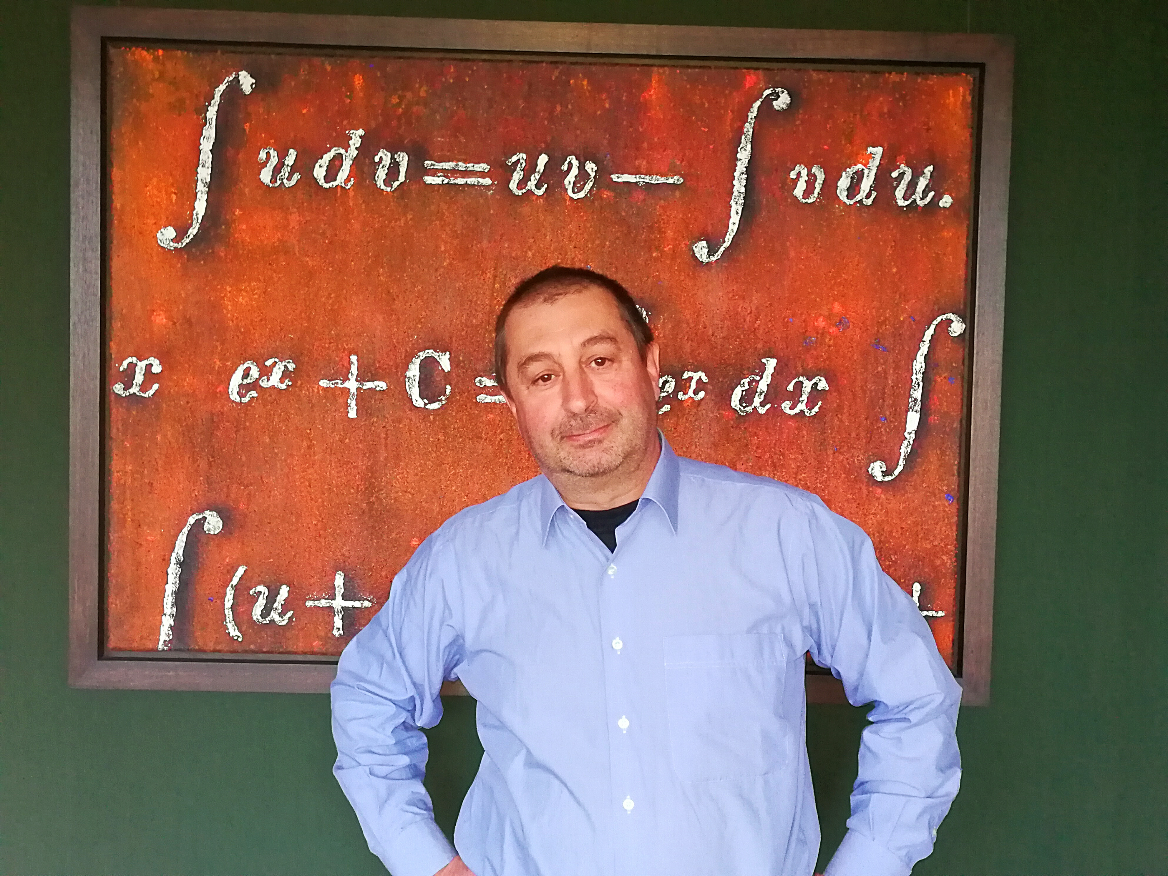 Francesc Torres Torres